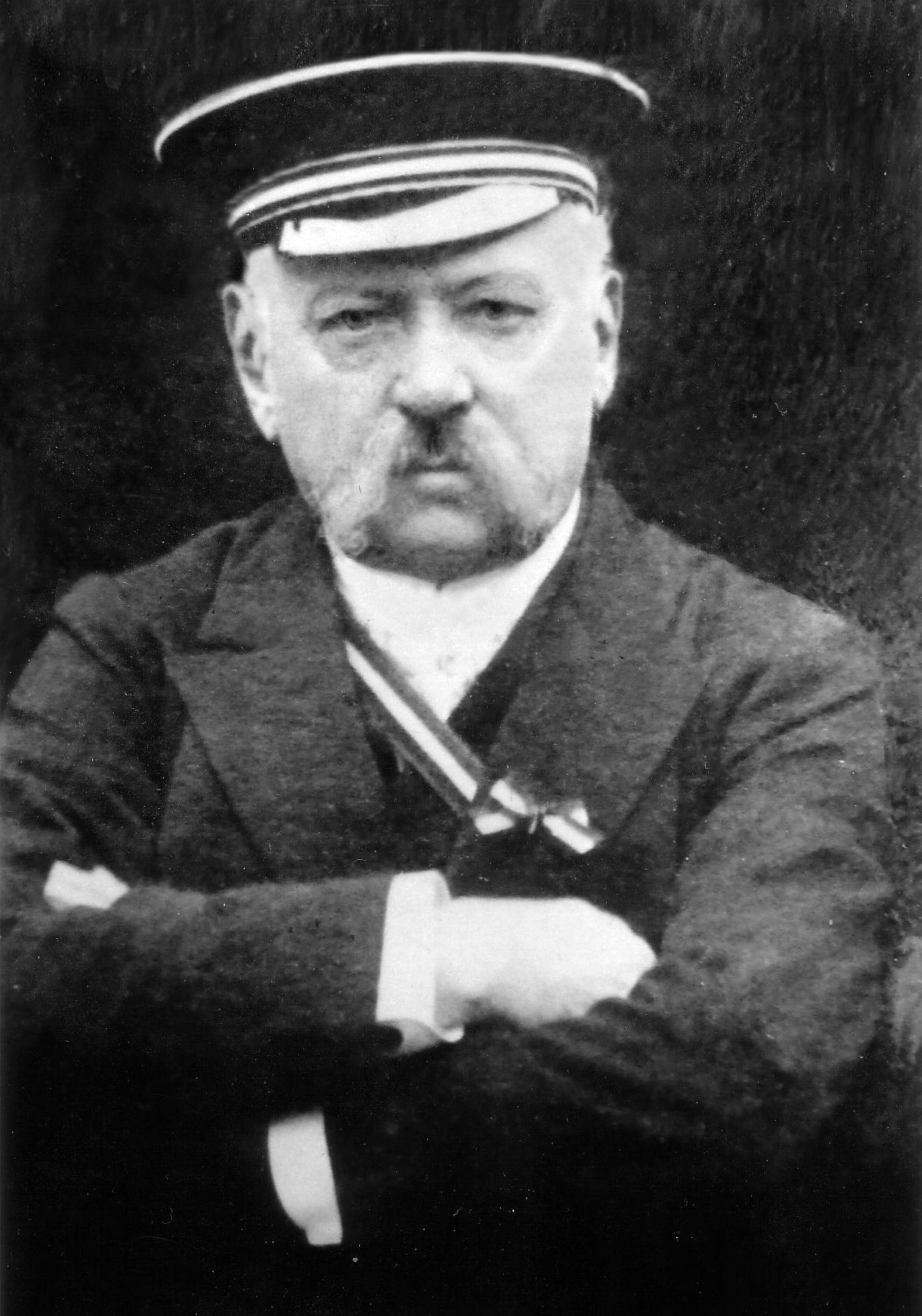 Fotografie von Dr. med. Rudolf Windelband (1839-1909)